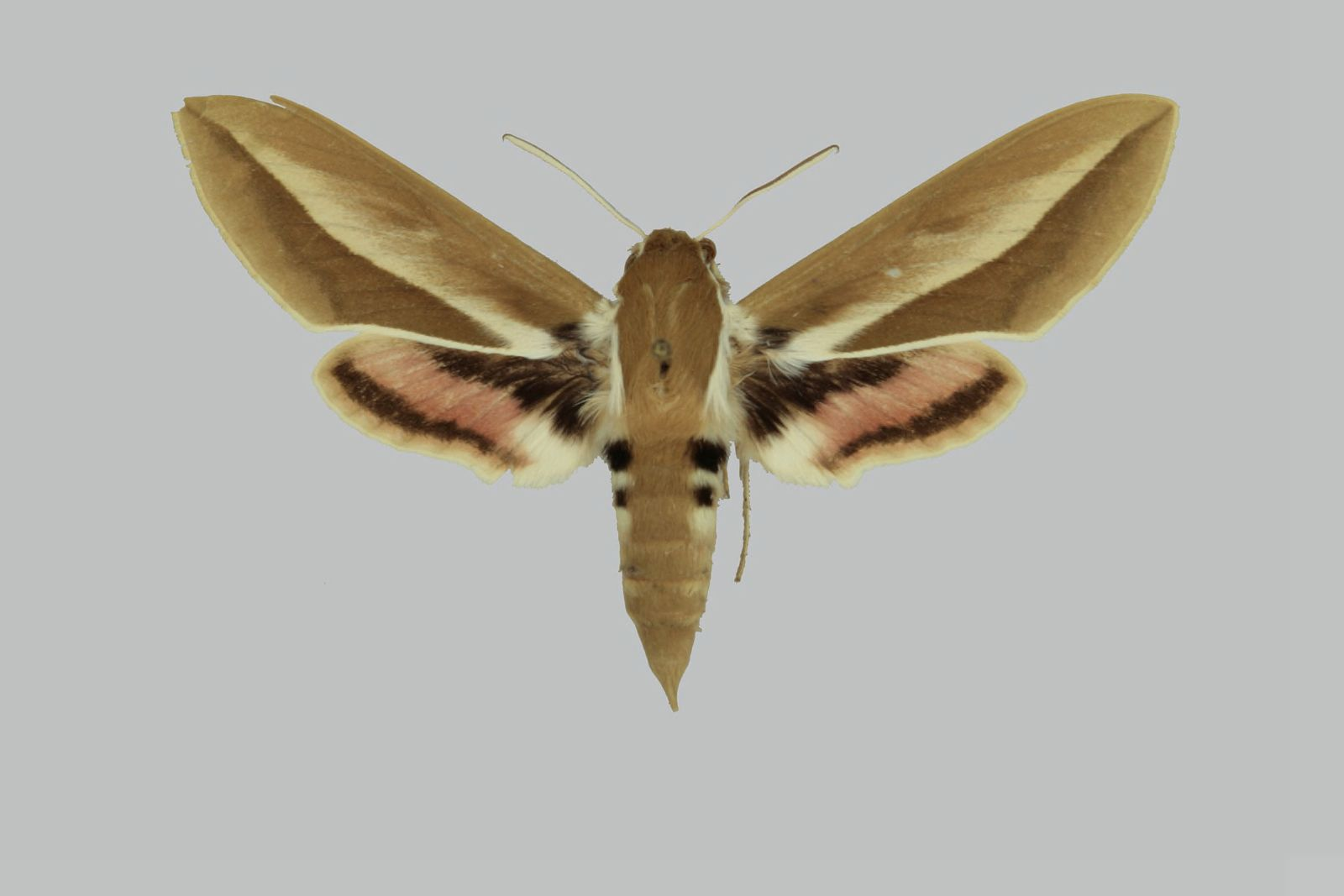 Hyles chamyla, female, upperside. Mongolia, Gobi Altay Aimak, Zahuin Gobi desert